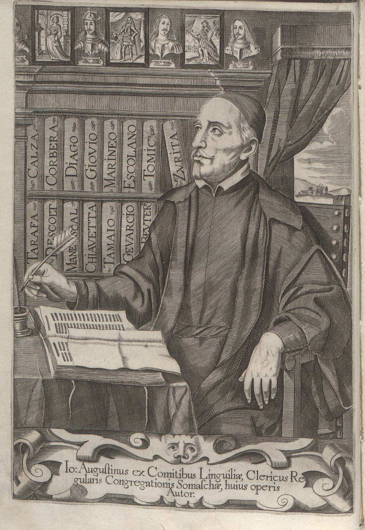 Retrato de Giovanni Agostino della Lengueglia como autor al frente de su tratado "Ritratti della prosapia, et heroi Moncadi nella Sicilia: opera historica-ecomiastica", Valencia, 1657